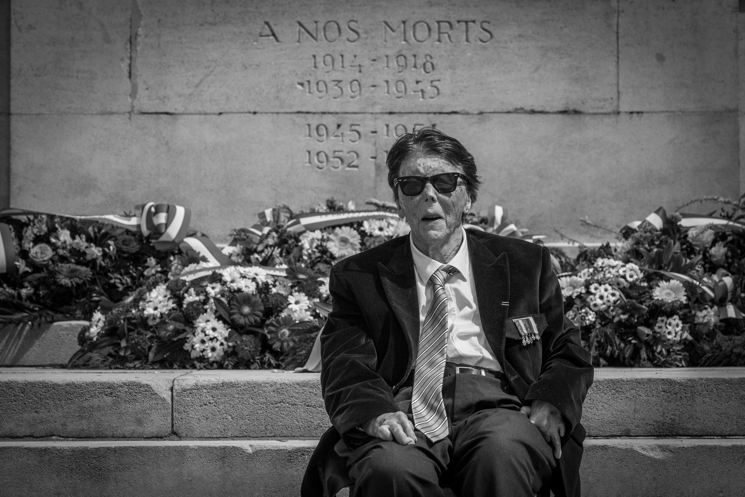 Jean-Jacques Bastian ancien Résistant du groupe « La Main Noire » devant le monument aux morts de Strasbourg.